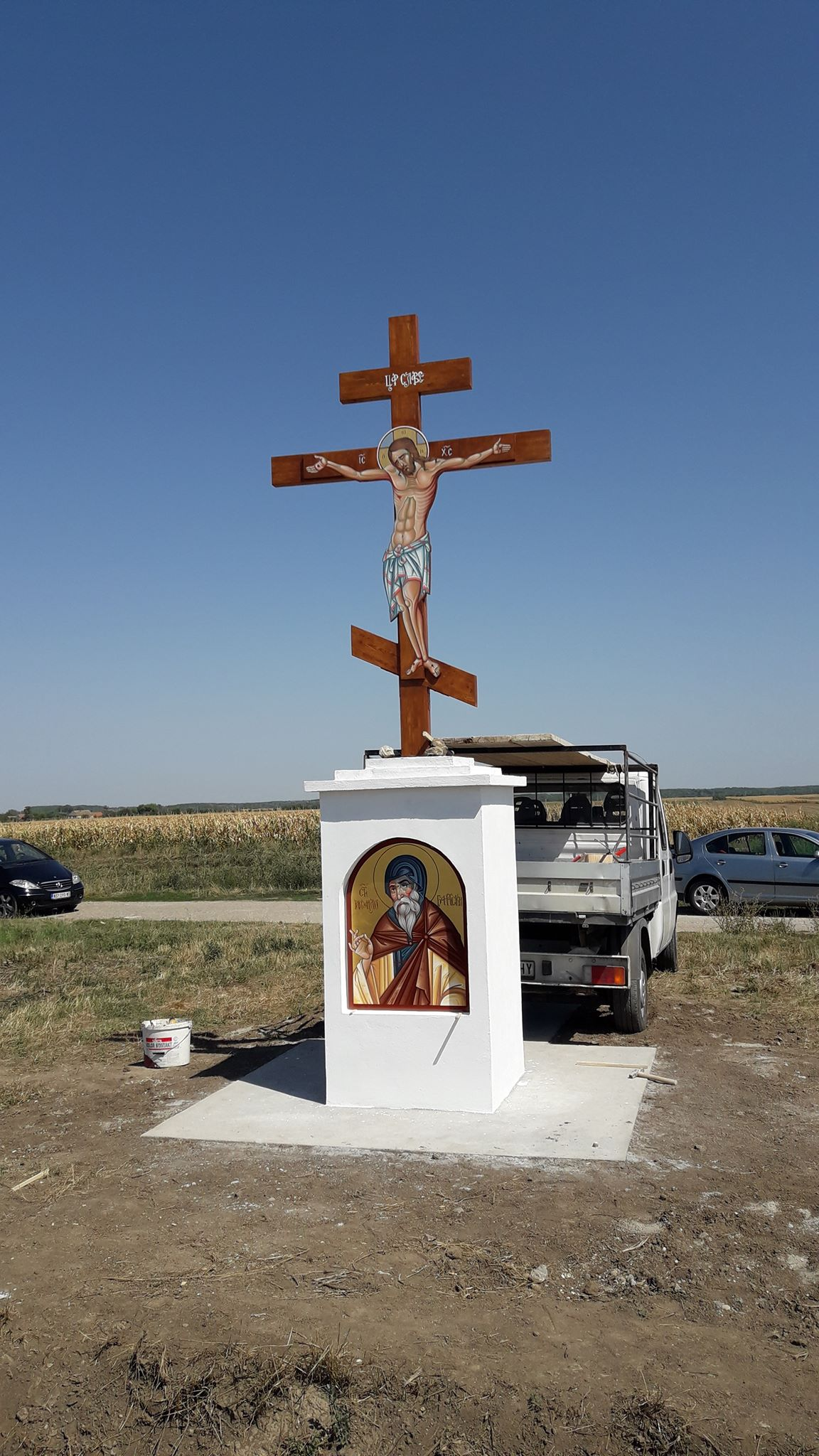 Krsno znamenje ispred ulaza u Idvor.